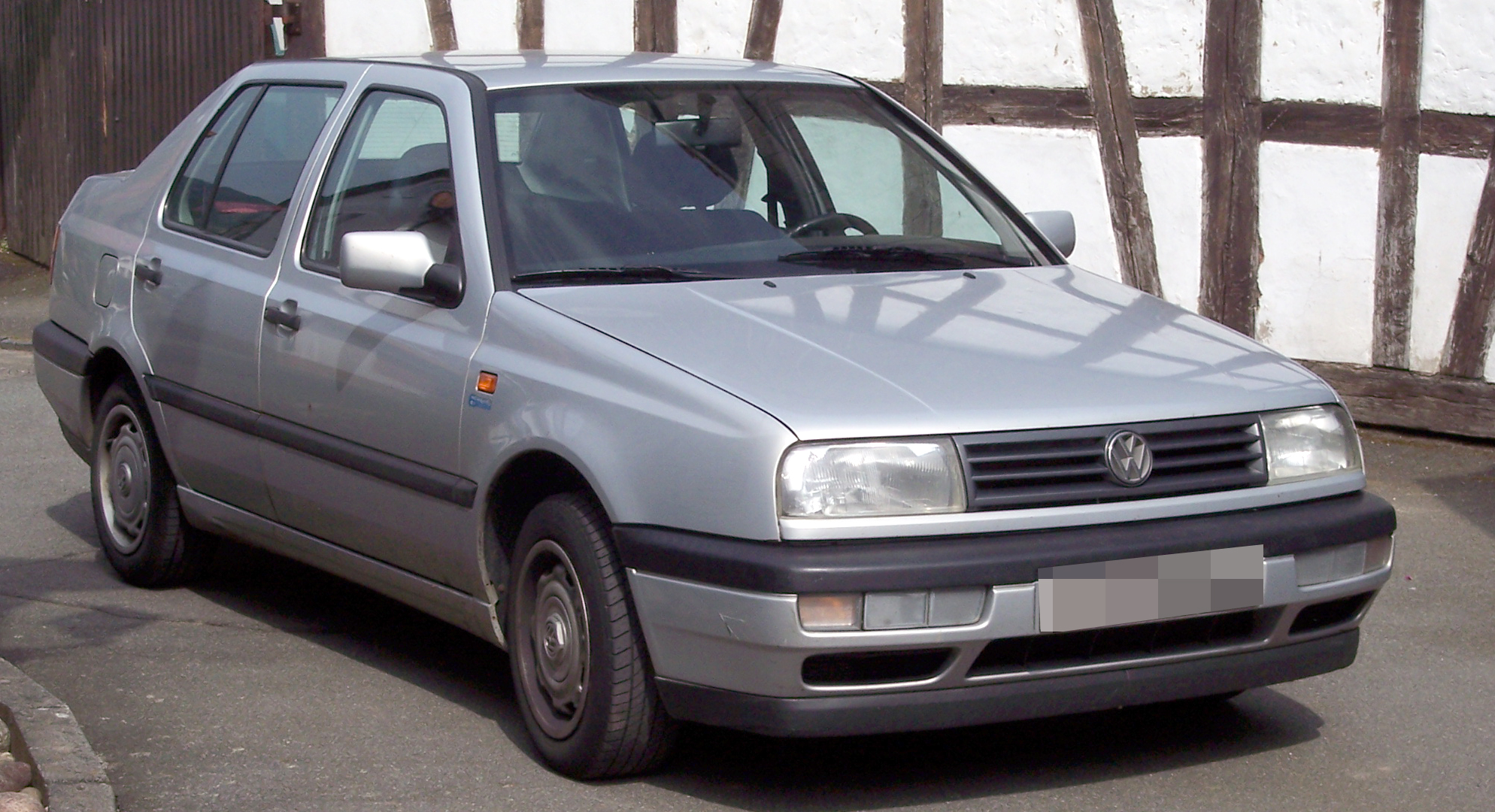 VW Vento GL / VW Jetta 3 GL